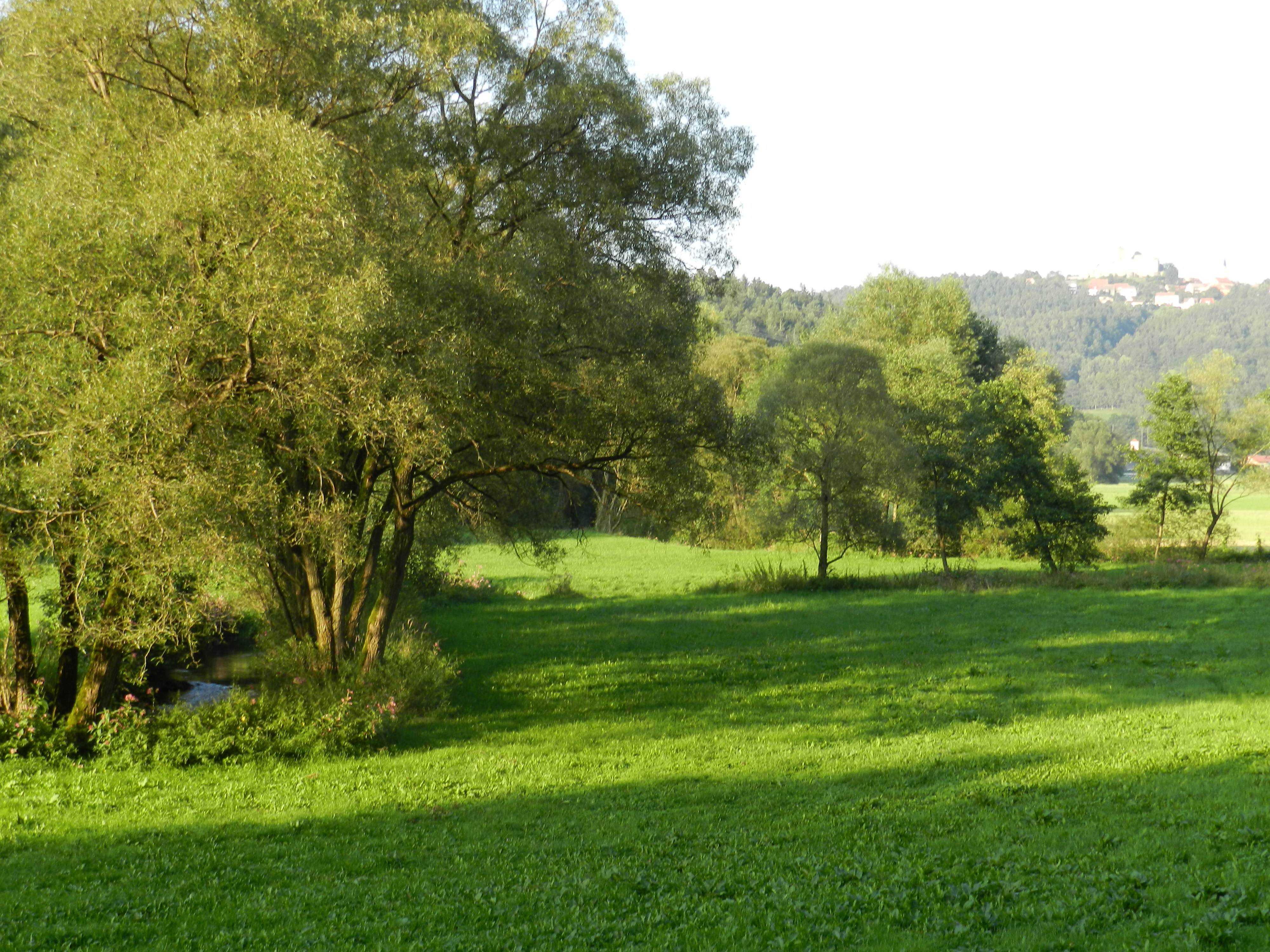 Die Luhe südlich von Lückenrieth, im Hintergrund Leuchtenberg (Landkreis Neustadt an der Waldnaab, Oberpfalz, Bayern) (2011)